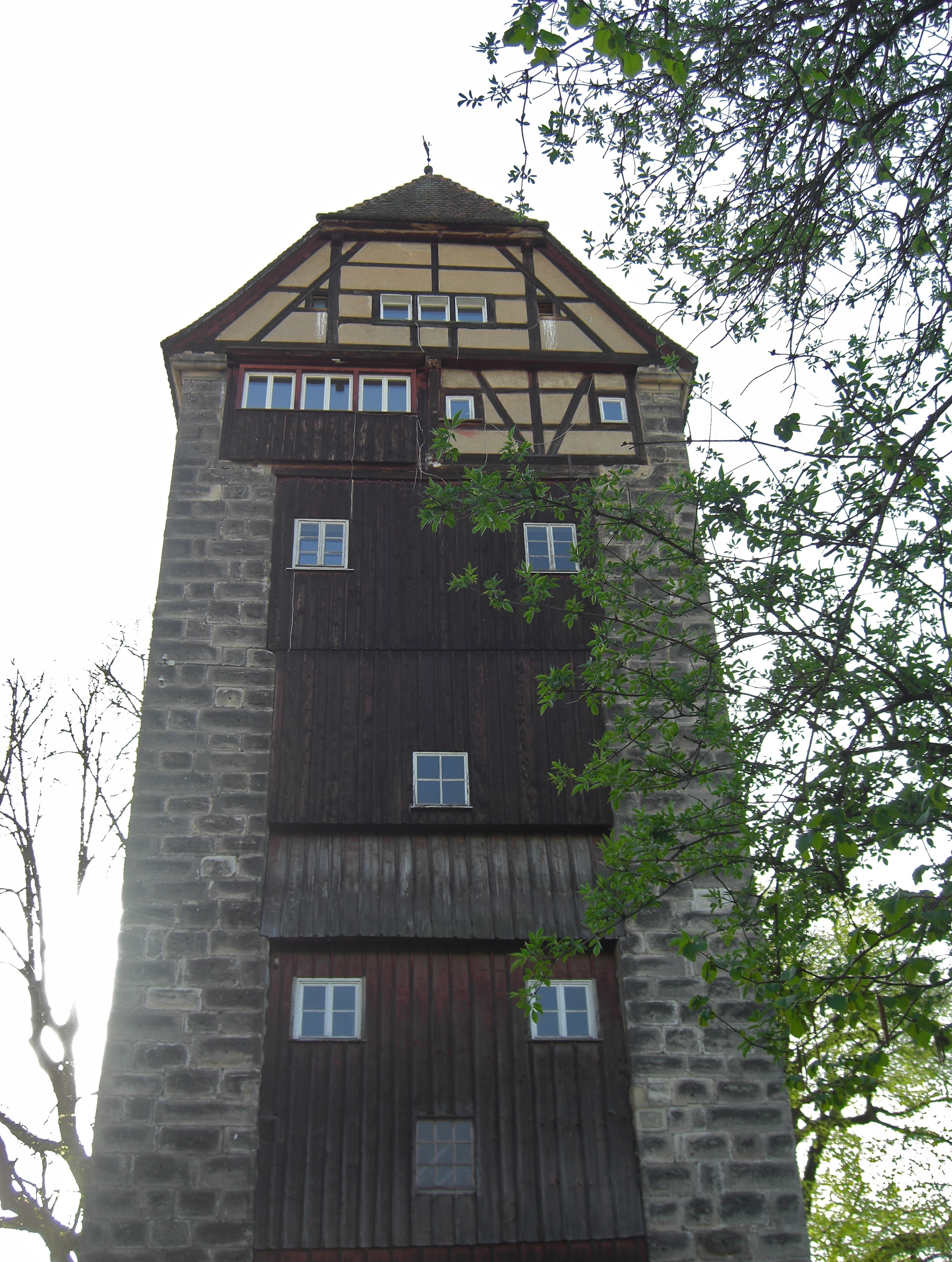 Fünfknopfturm in Schwäbisch Gmünd Innenseite